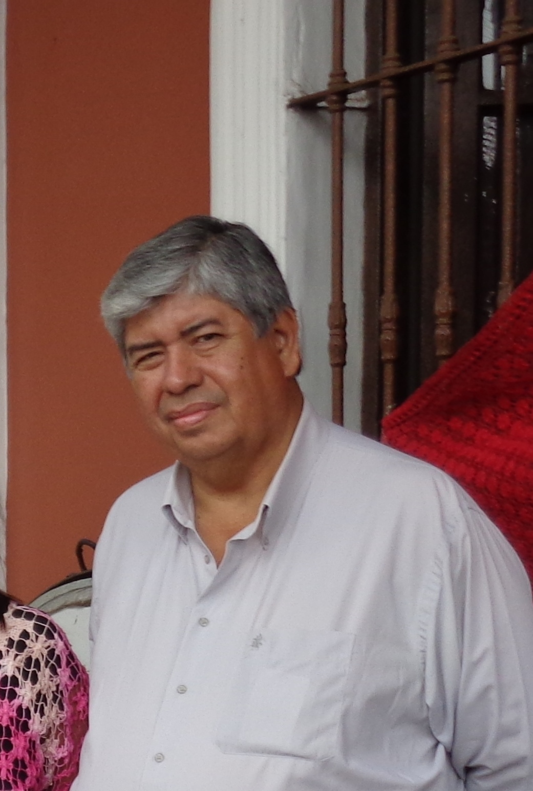 Dr. David Galeano Olivera en San Lorenzo, Paraguay.